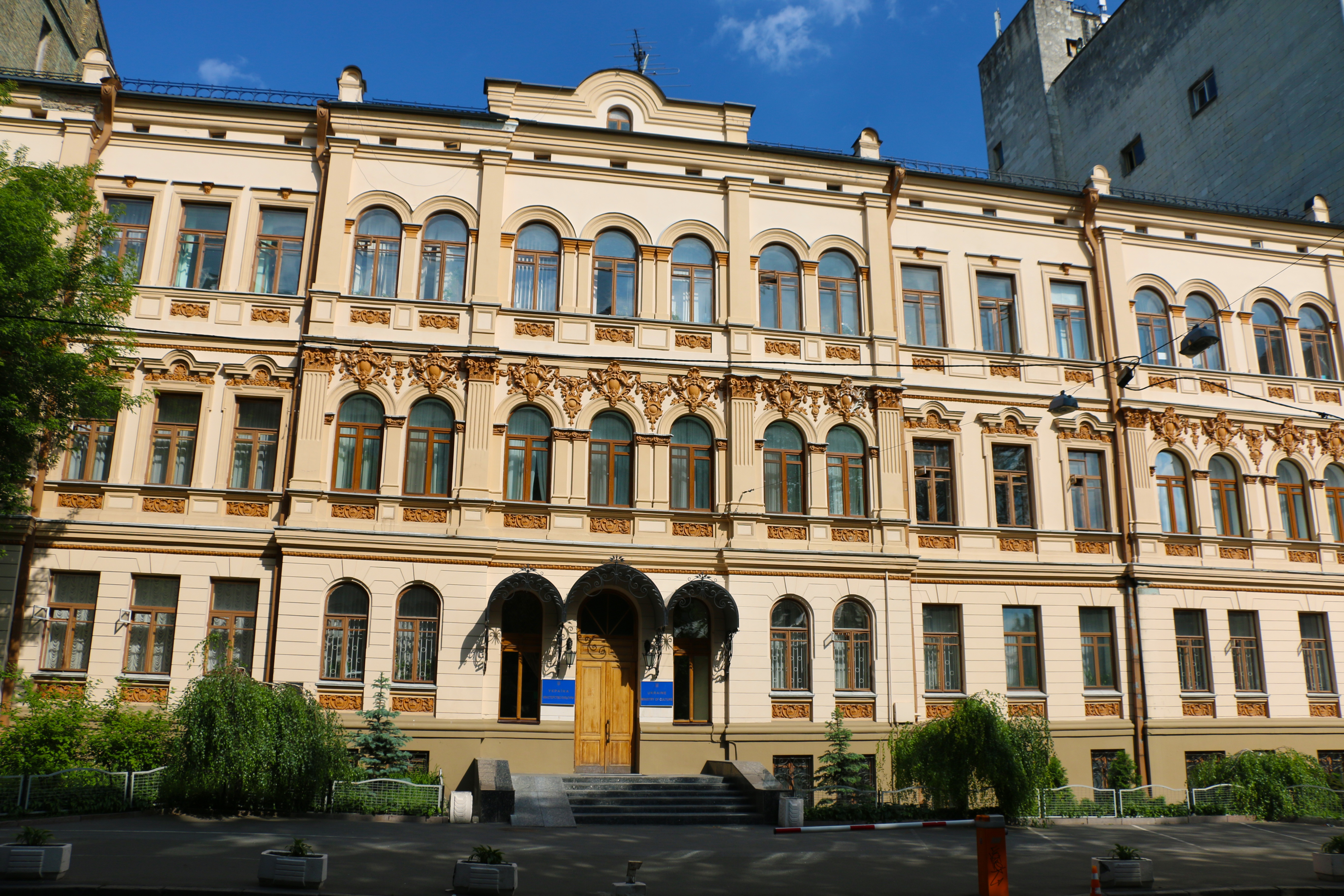 Будинок прибутковий, Київ, Франка Івана вул., 19